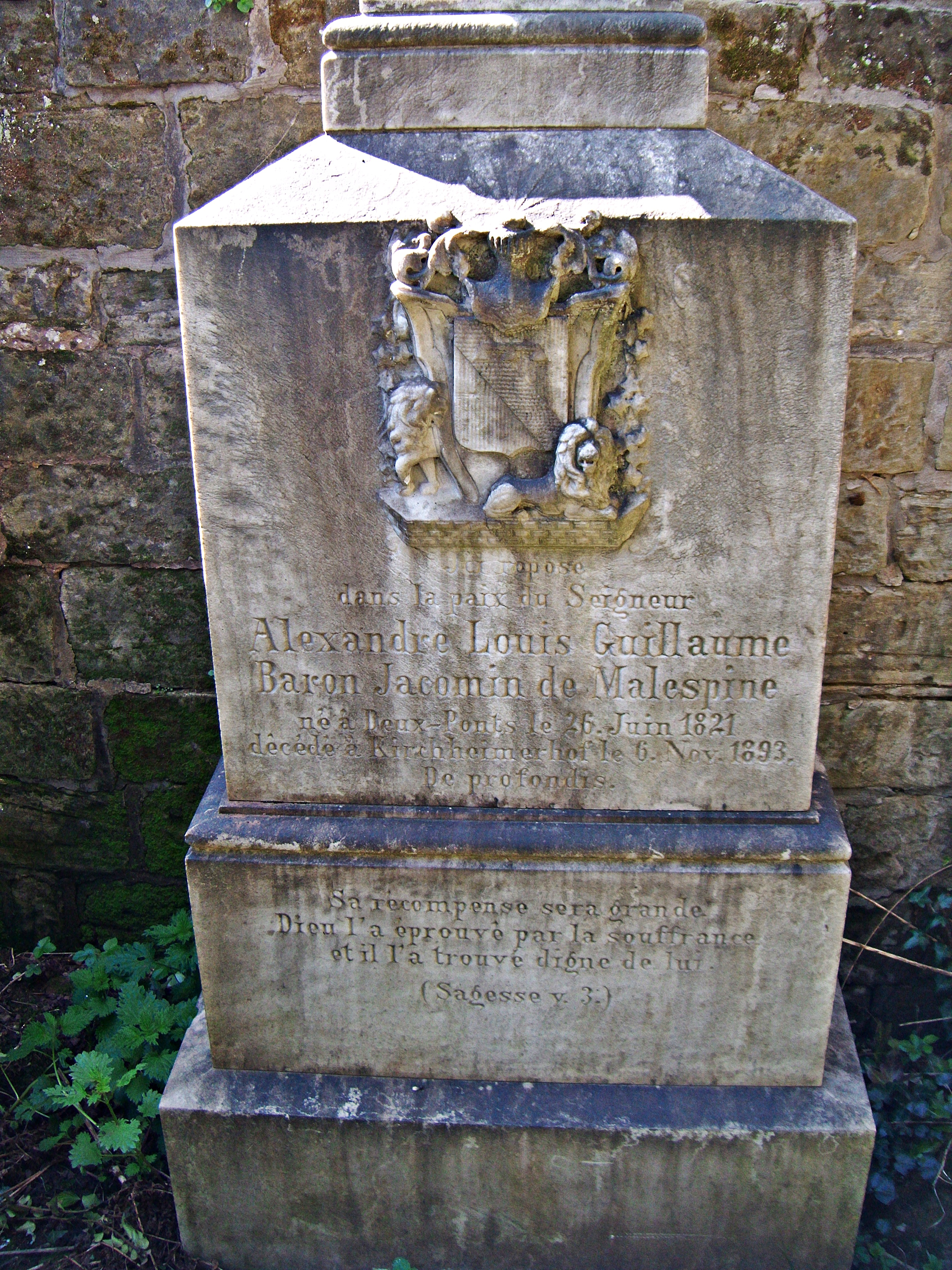 Hauptfriedhof Zweibrücken, Grabstein von Baron Alexandre Louis Guillaume Jacomin de Malespine (1821-1893)